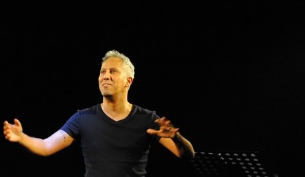 Alessandro Ghebreigziabiher, spettacolo di teatro narrazione in occasione della IX Edizione Rassegna Il dono della diversità, Roma